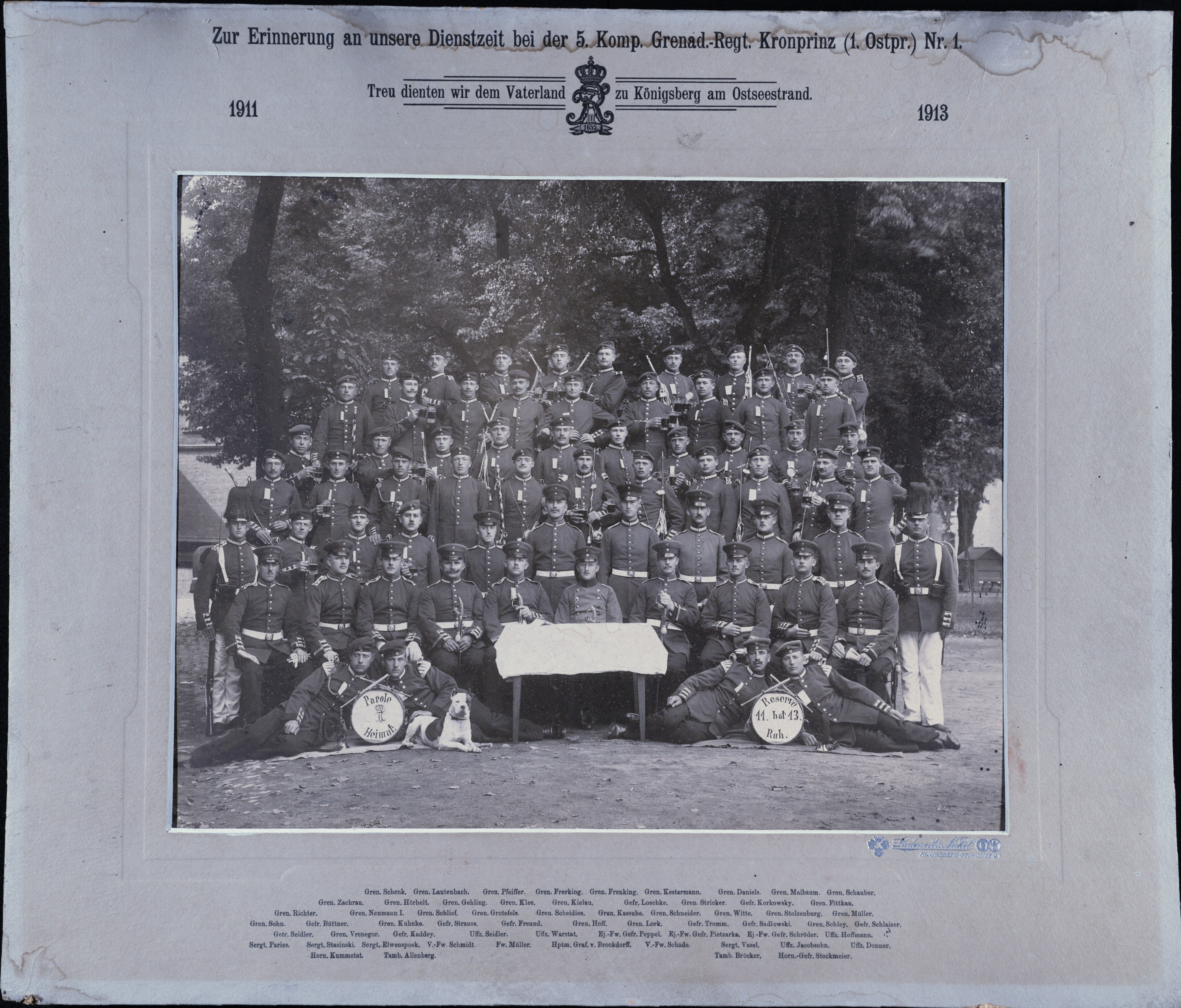 1. Ostpreußische Grenadierregiment Nr. 1 „Kronprinz bei der Entlassung, Schulterklappen hoch bei den Reservisten, Entlassungsschein im Waffenrock